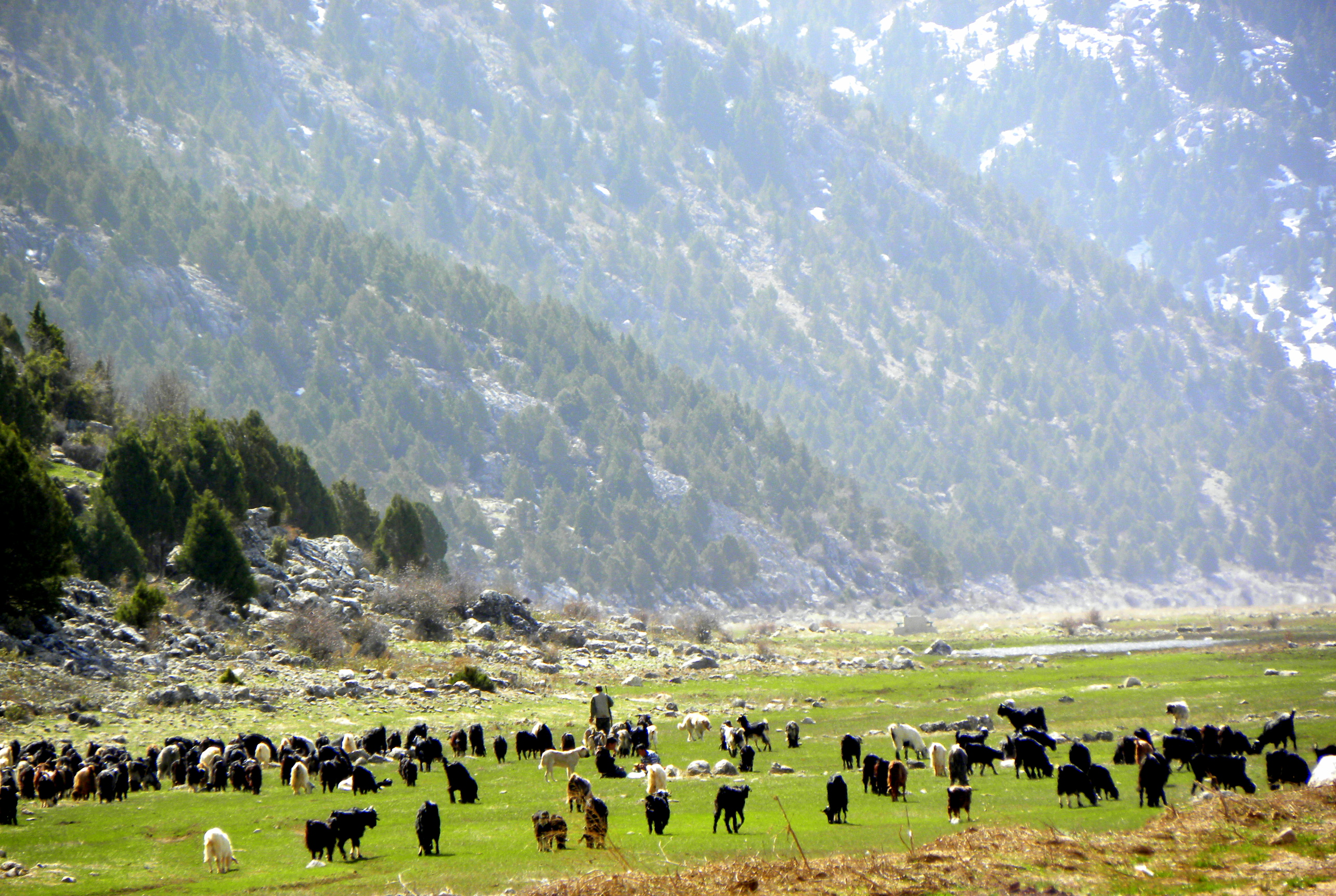 gembos ovasında keçi sürüsü